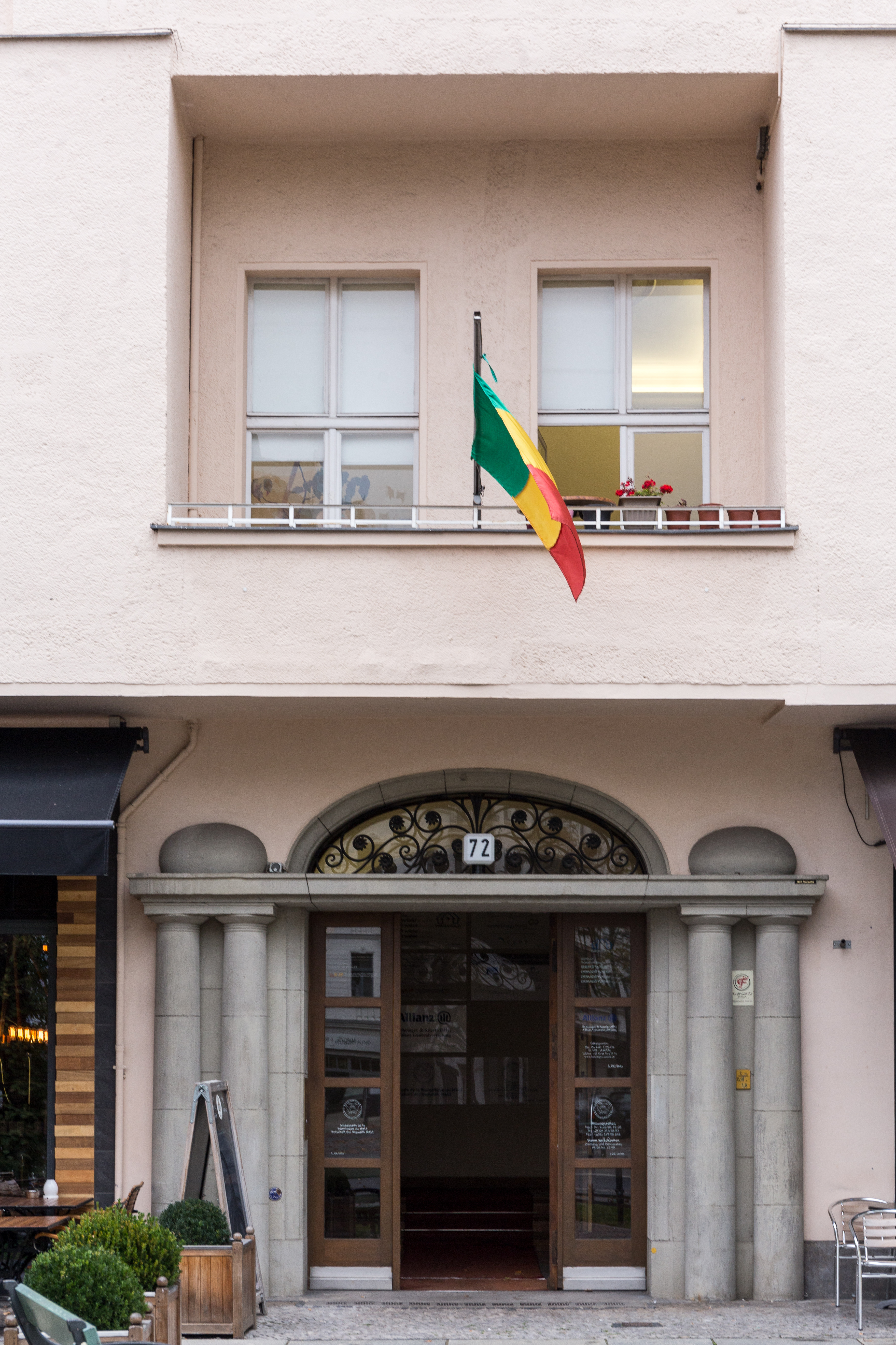 Ambassade du Mali à Berlin, Kurfürstendamm 72.